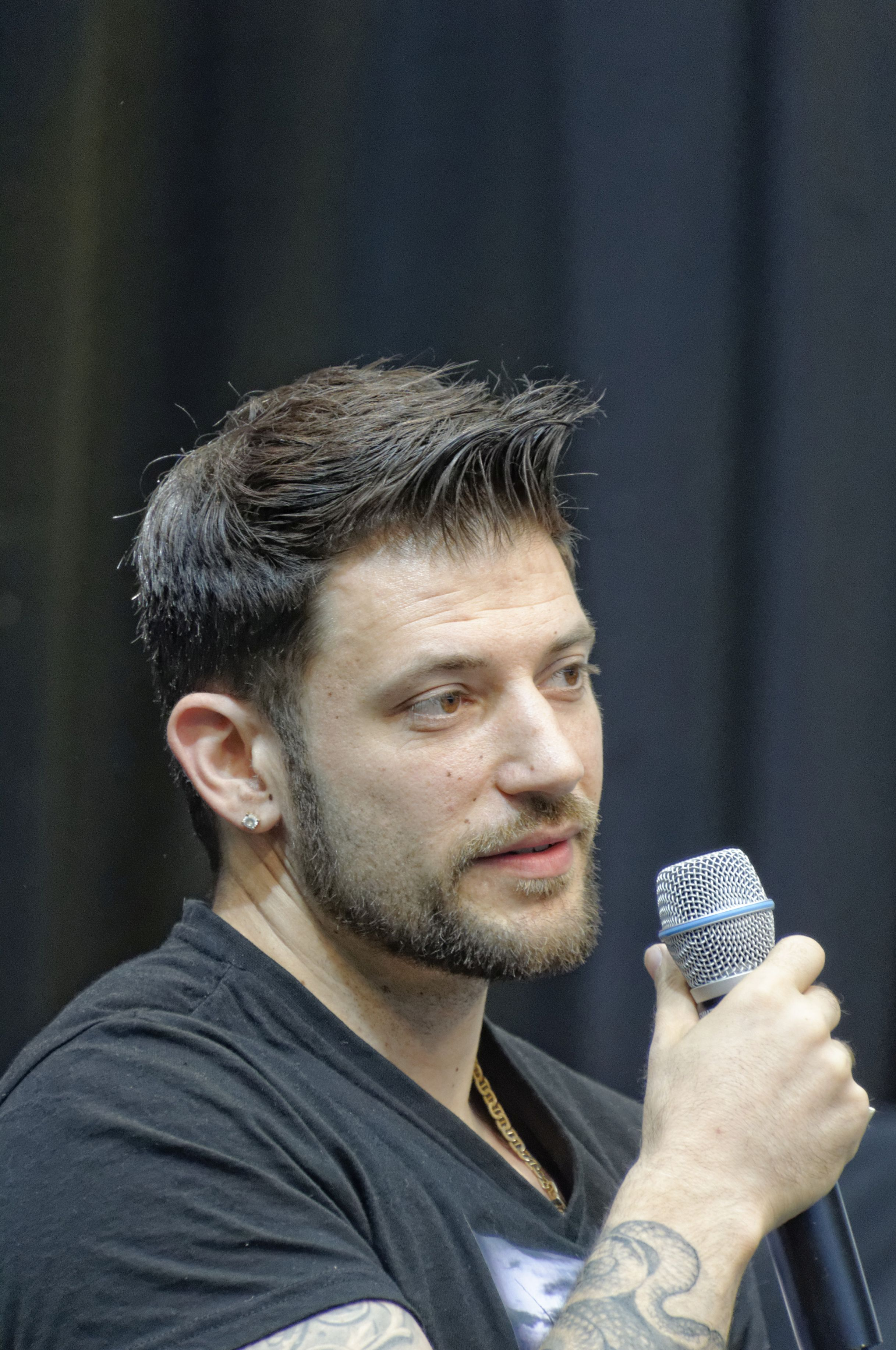 Bilder von der Comic Con Germany in Stuttgart 2018